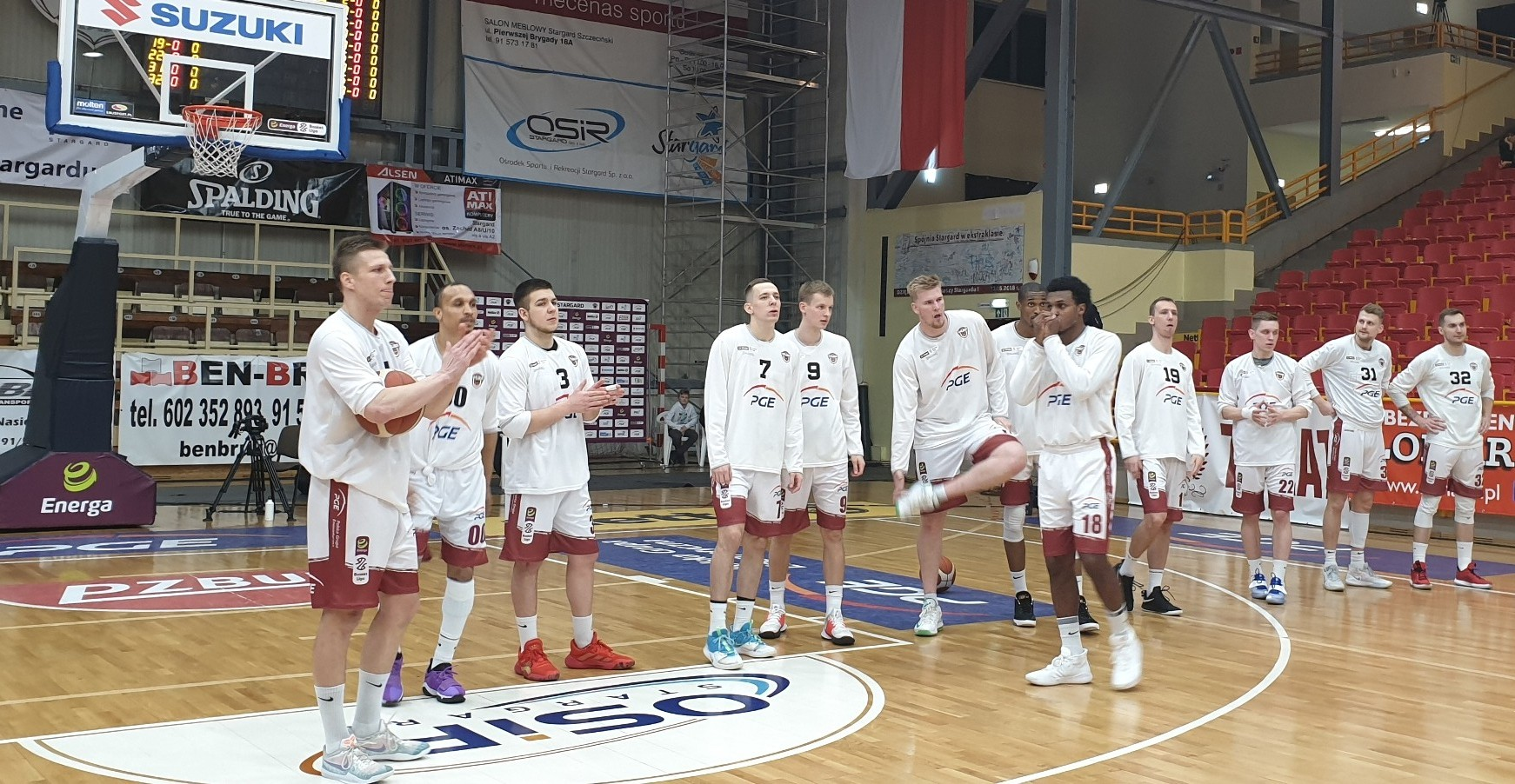 Stargard. PGE Spójnia (08.03.2020)